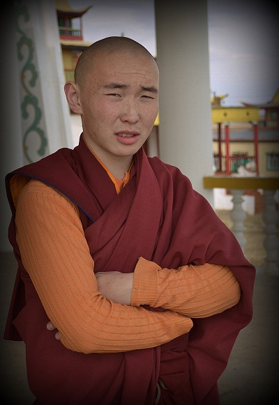 Хуварак Сартул-Гэгэтуйского дацана, село Гэгэтуй, Джидинский район, Республика Бурятия